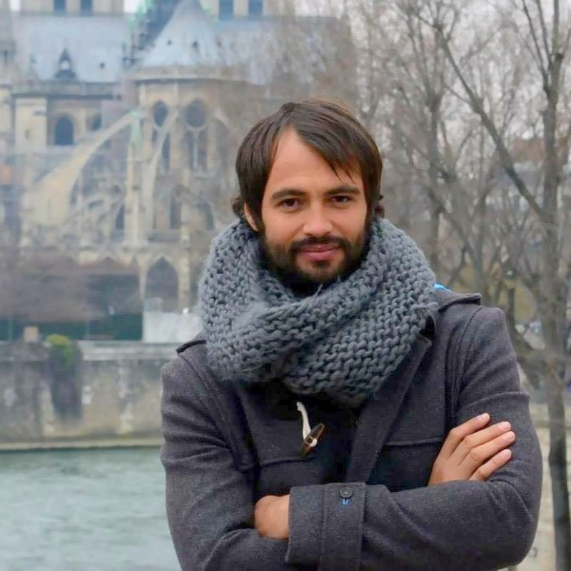 Gerardo Begérez a orillas del Sena el 26 de marzo 2015 fecha de aniversario con su pareja